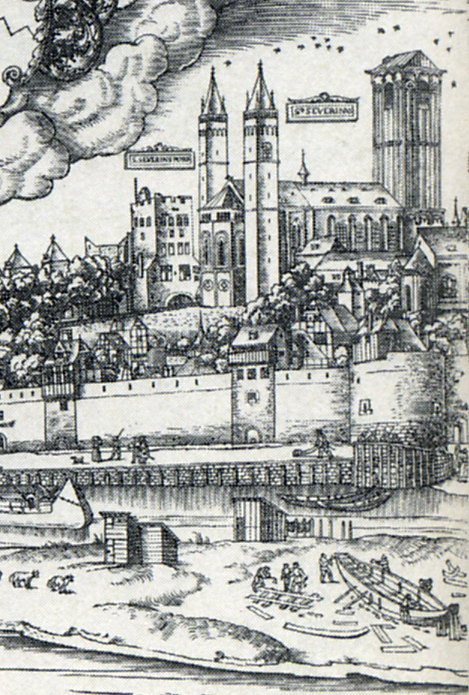 Ausschnitt, Ecclesia-Sancti-Severini-et-Porta-Sancti-Severini-Colonia, aus dem Holzschnitt „Große Ansicht von Köln“